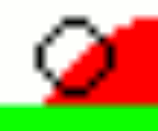 Voorbeeld met vergroten, eigen werk.